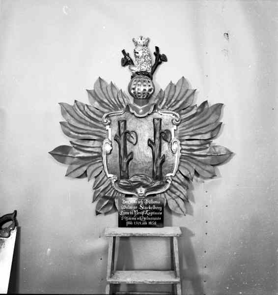 Begravningsvapen, huvudbanér över Wolmar Stackelberg 1652. Kategori: (09) Vapen Begravningsvapen, huvudbanér över Wolmar Stackelberg 1652.